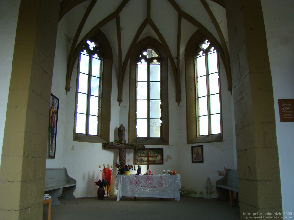 Ottilienberg bei Eppingen, Inneres der Wallfahrtskapelle